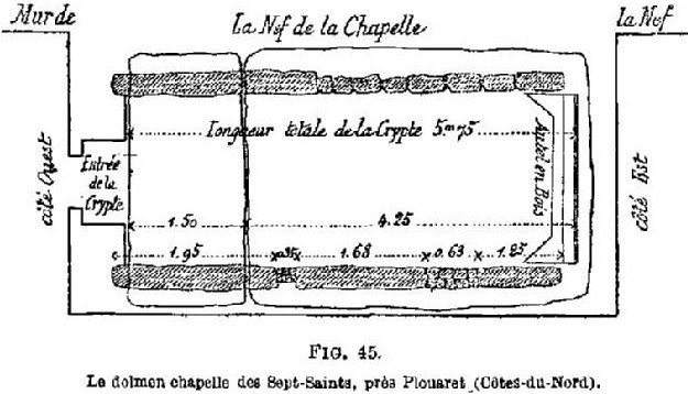 Plan de la chapelle-dolmen des Sept-Saints, commune du Vieux-Marché, en 1888